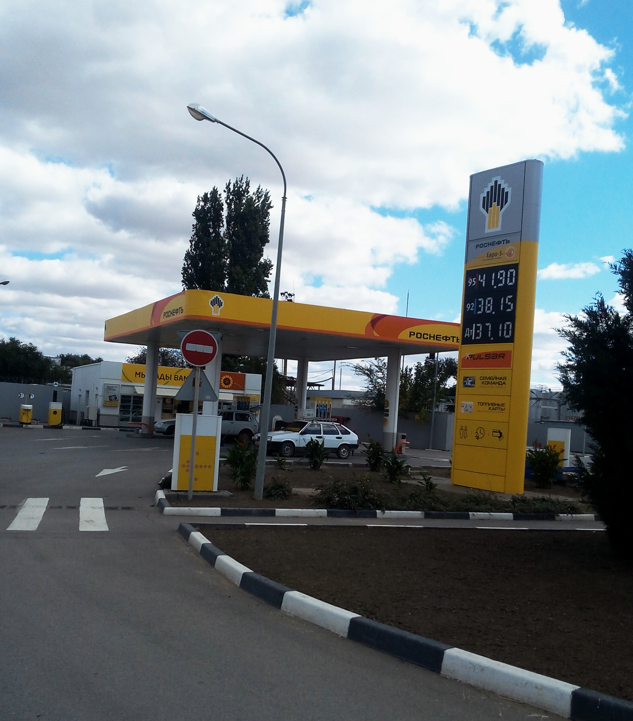 г. Сальск, ул. Островского, АЗС у нефтебазы Роснефть